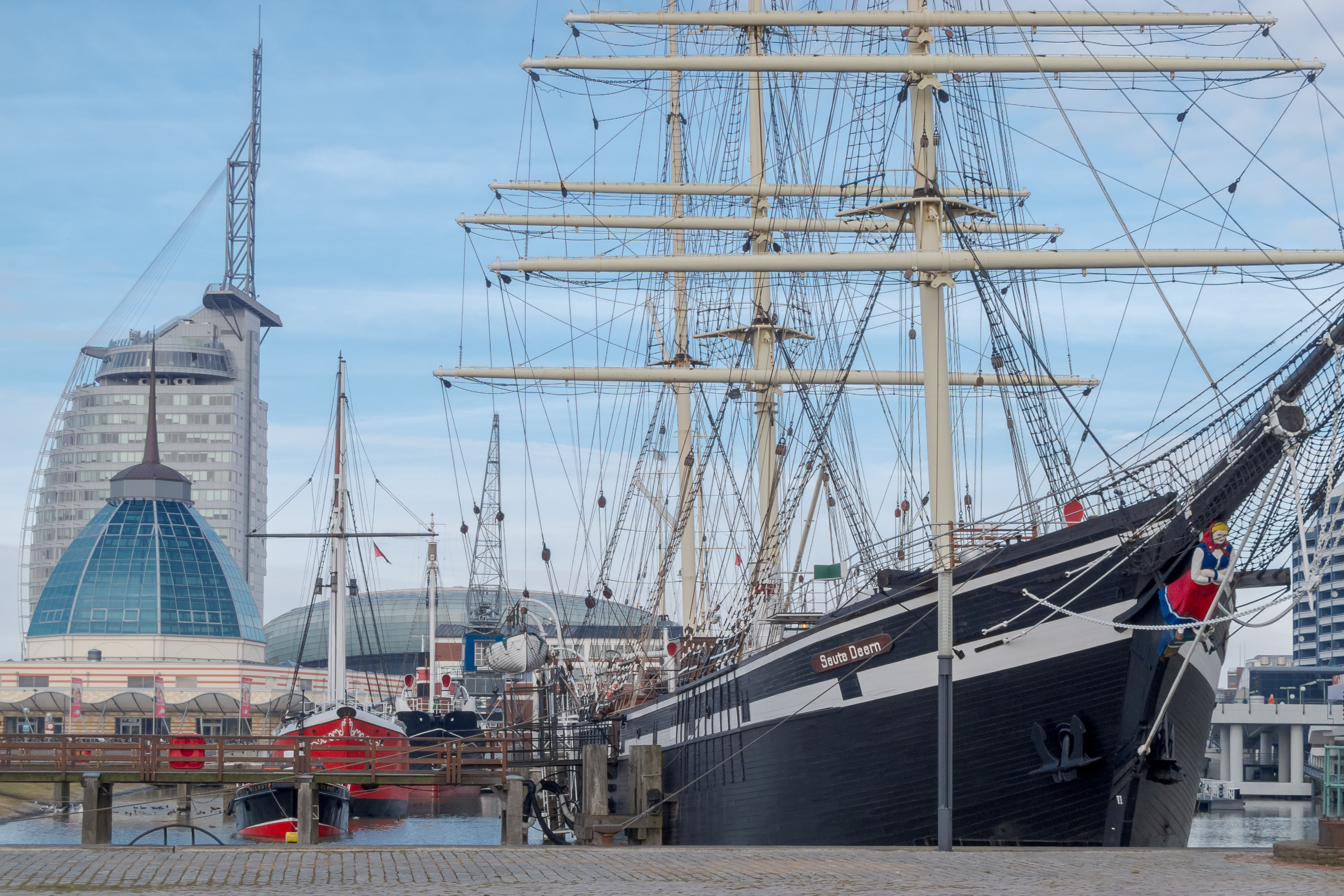 Bremerhaven: Atlantic Hotel Sail City, Mediteraneum, Klimahaus, Bark "Seute Deern" und andere Museumsschiffe im Alten Hafen.